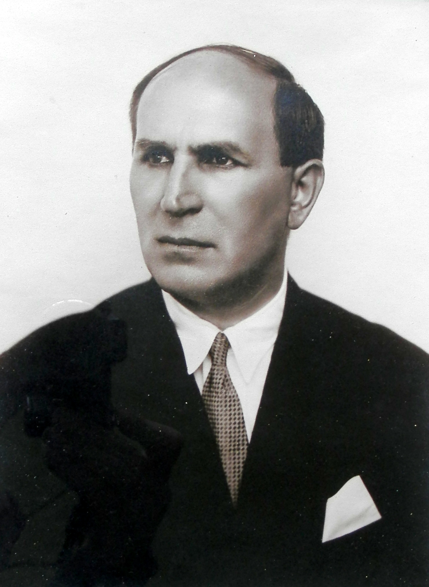 Karolj Sirmai,1930. godina